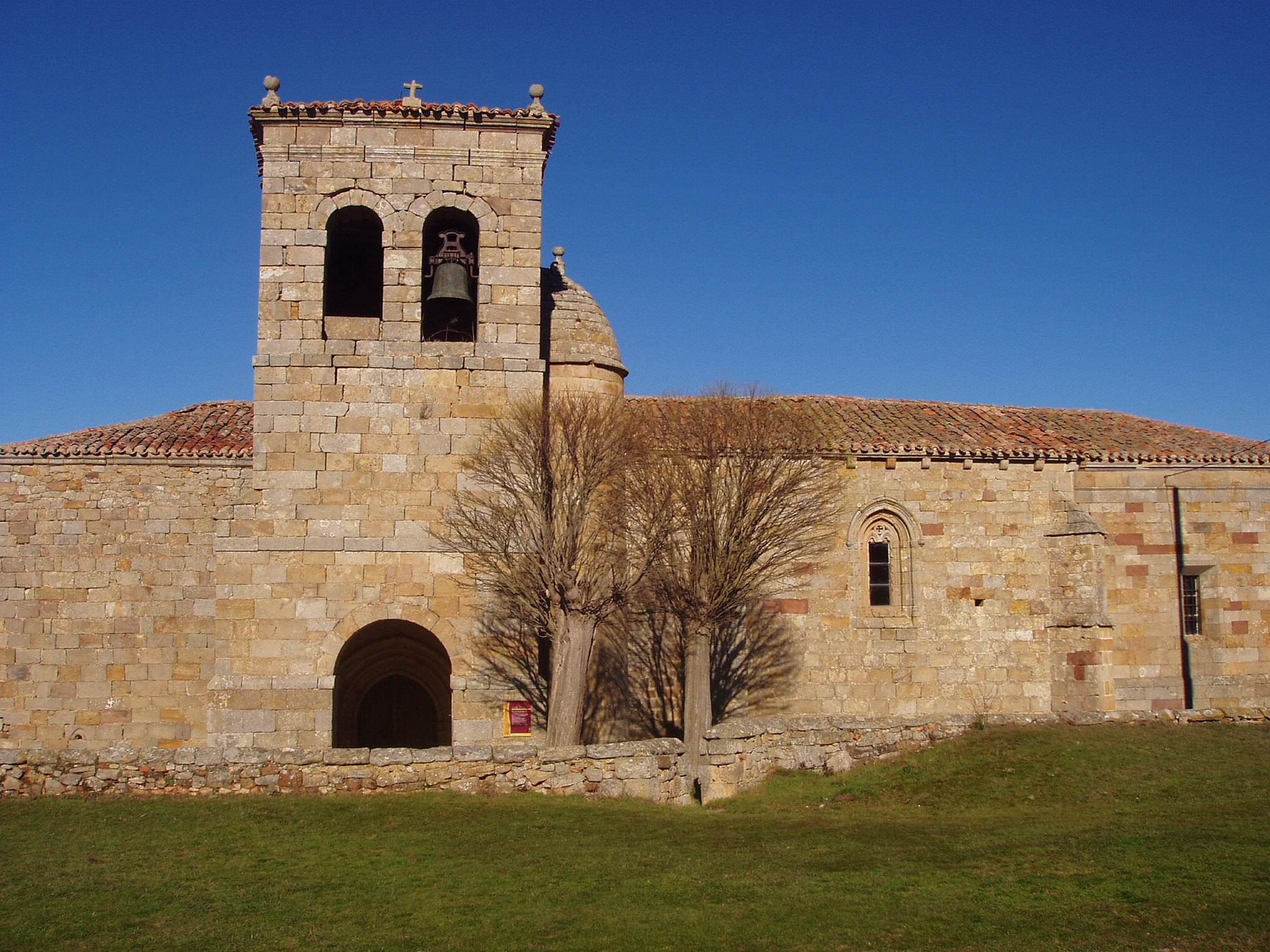 foto tomada del album personal